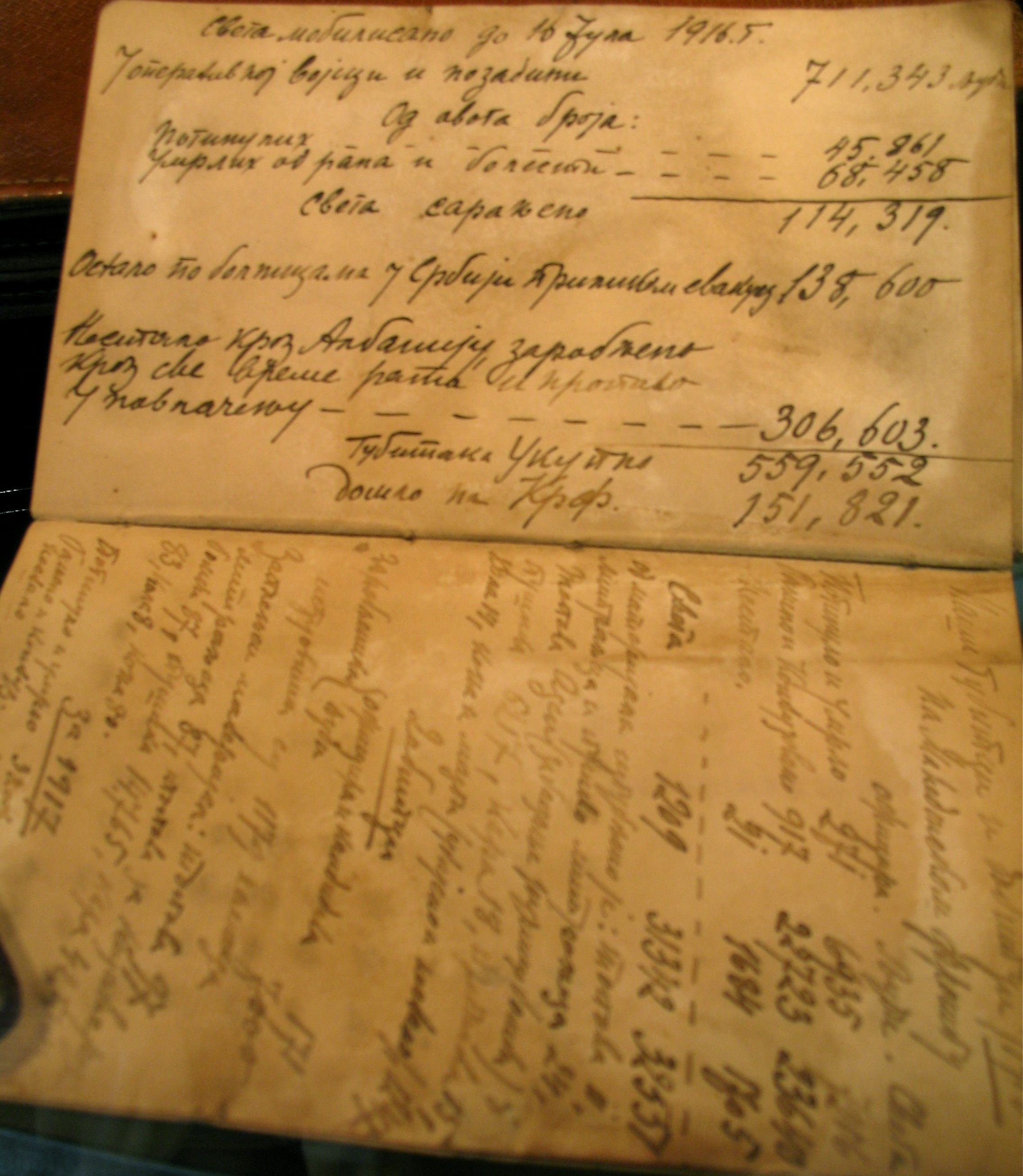 Војне забелешке регента Александра I